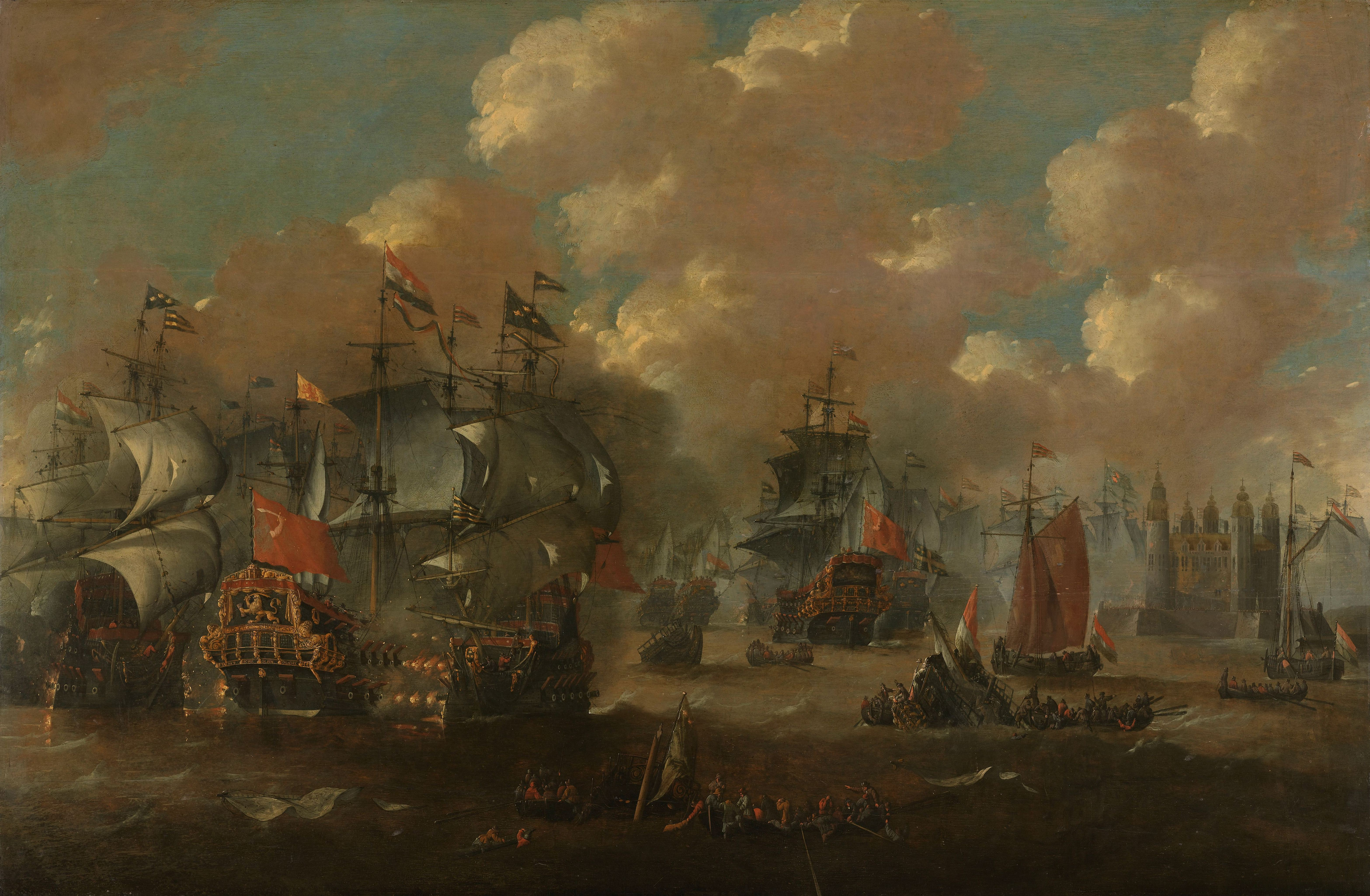 Zeeslag bij Elseneur in de Sont tussen de Hollandse en de Zweedse vloot, 8 november 1658. Tussen de oorlogsschepen verschillende sloepen en wrakken van gezonken schepen. Op de achtergrond kasteel Kronborg.